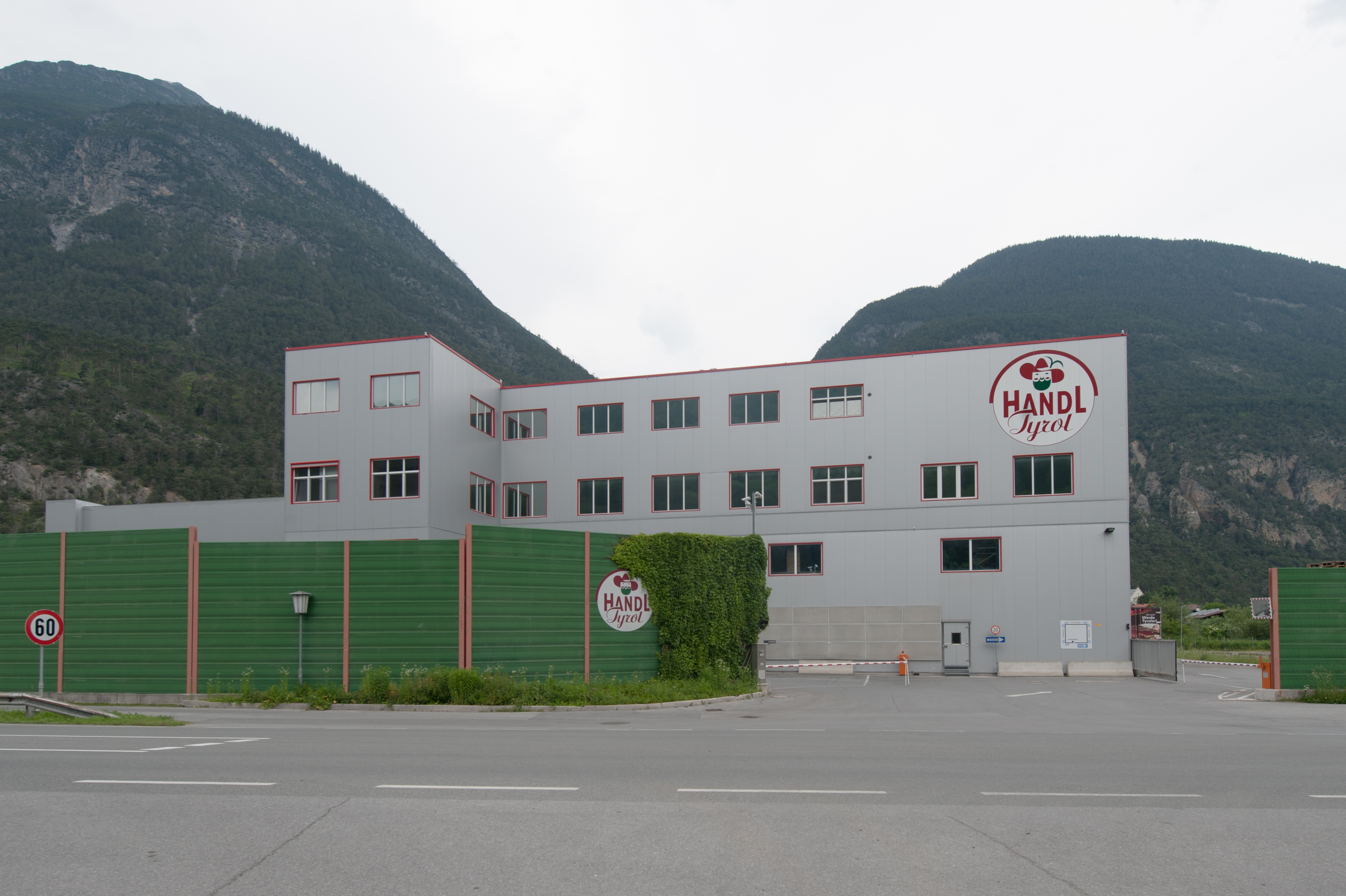 Wiki takes Nordtiroler Oberland: Handl Tyrol